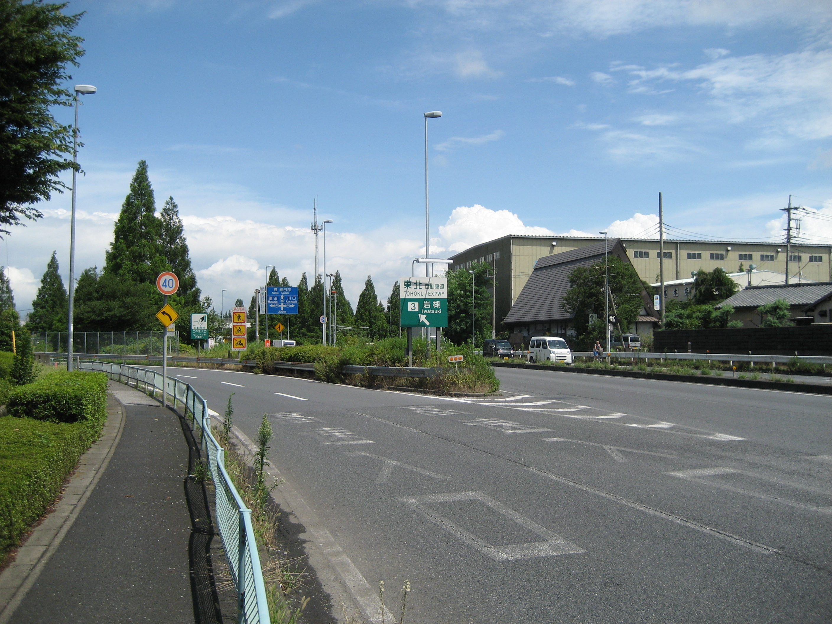 東北自動車道岩槻IC大宮方面側入口